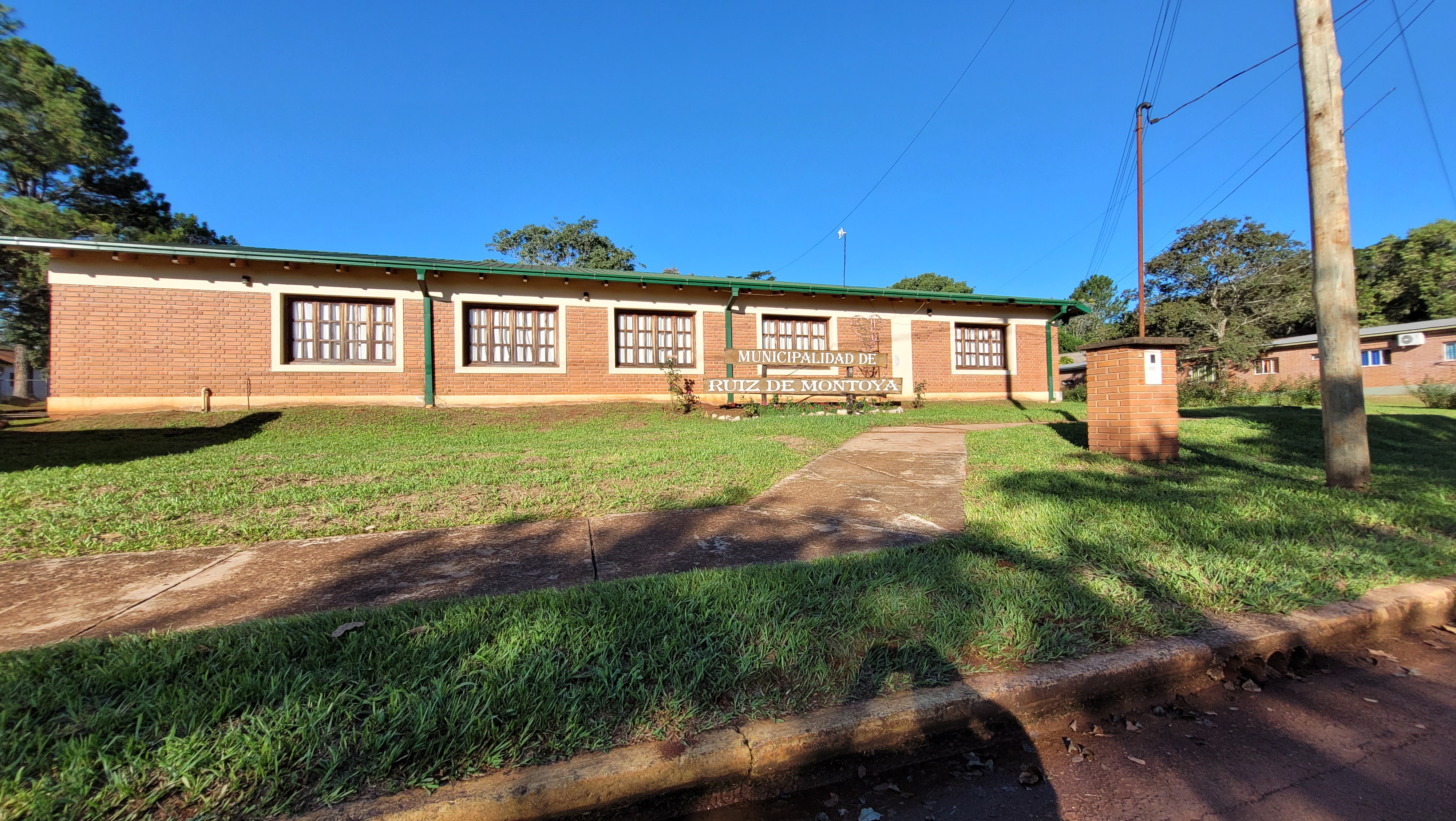 Escudo de la Municipalidad de Ruiz de Montoya, Provincia de Misiones, Argentina. Fuente: periodista Horacio Cambeiro, extraído del Gran Atlas de Misiones. Ilustración: Marcelo Celestino.